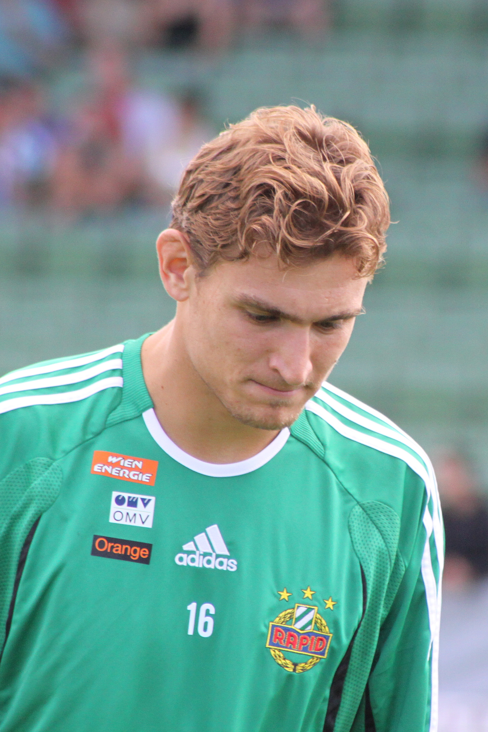 Nikica Jelavić - SK Rapid Wien (1)